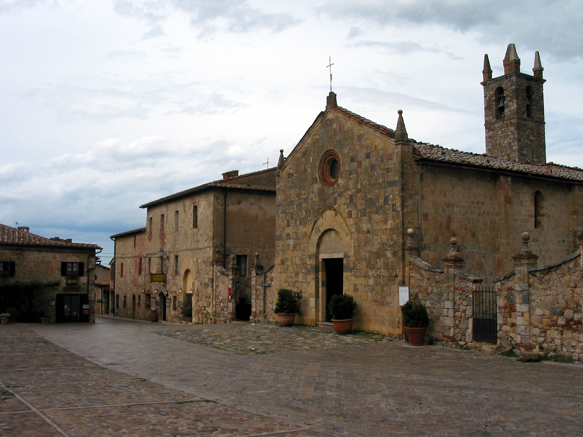 Monteriggioni, Piazza e Chiesa